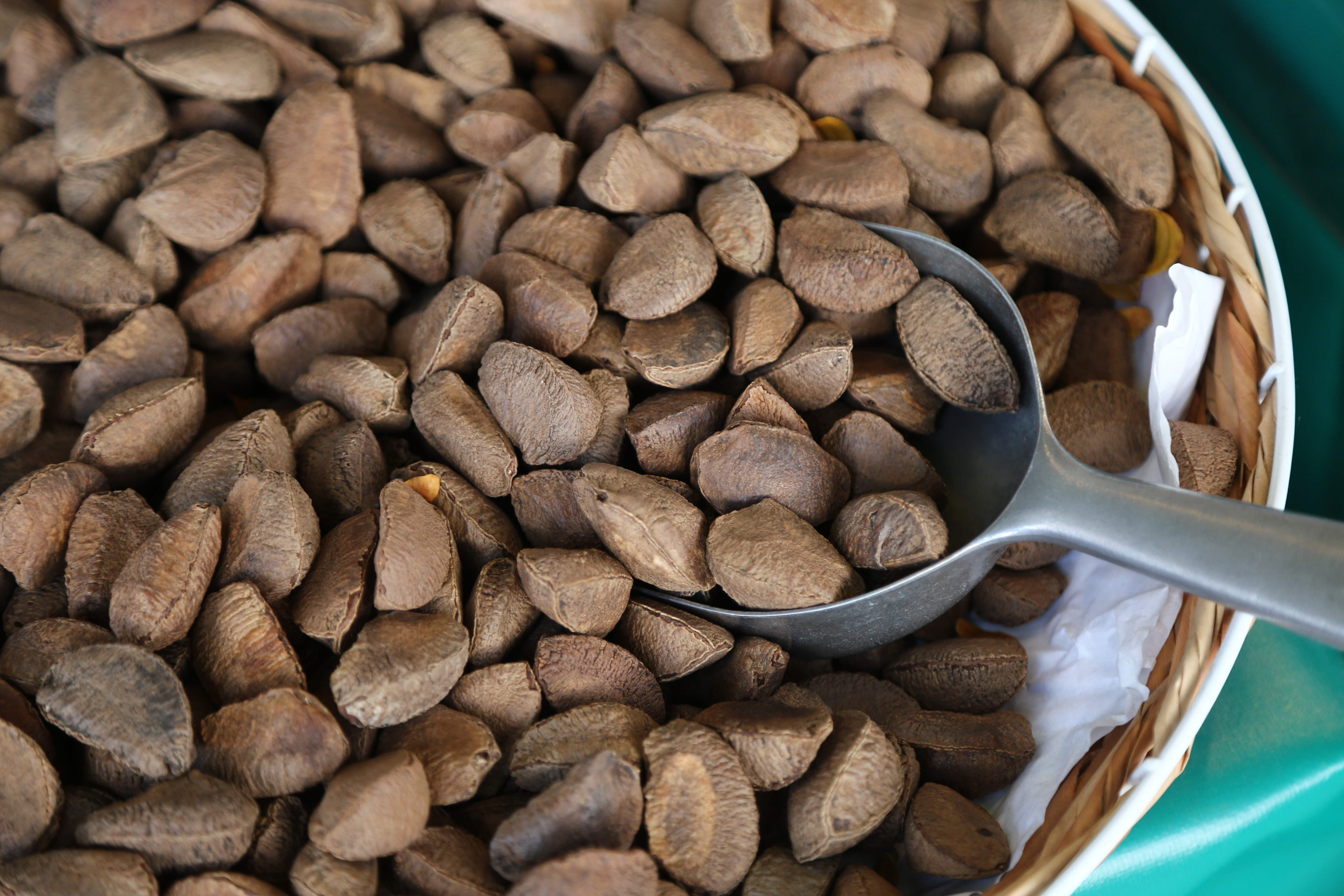 Paranüsse auf dem Münchner Viktualienmarkt